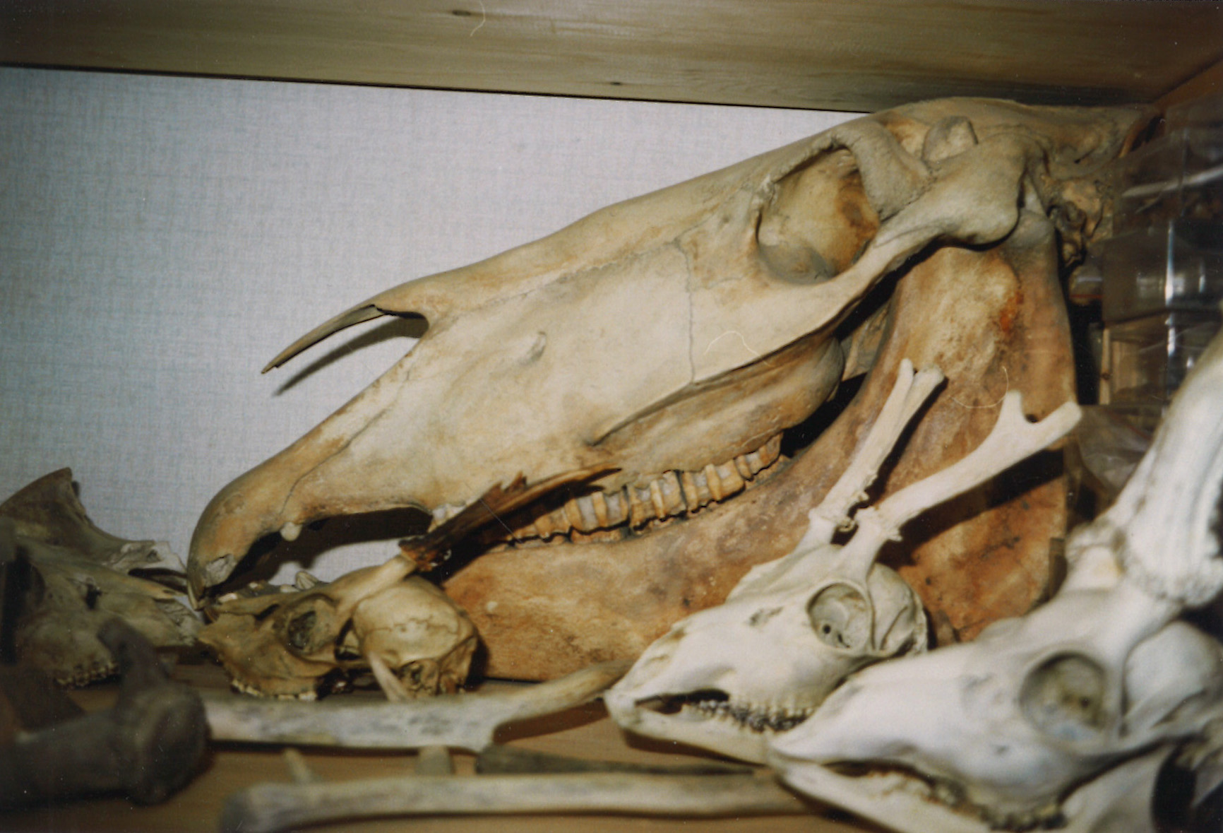 Skulls of three roe deer and horse. Archaeozoology bone laboratory, Rijksdienst voor het Cultureel Erfgoed, Amersfoort, The Netherlands